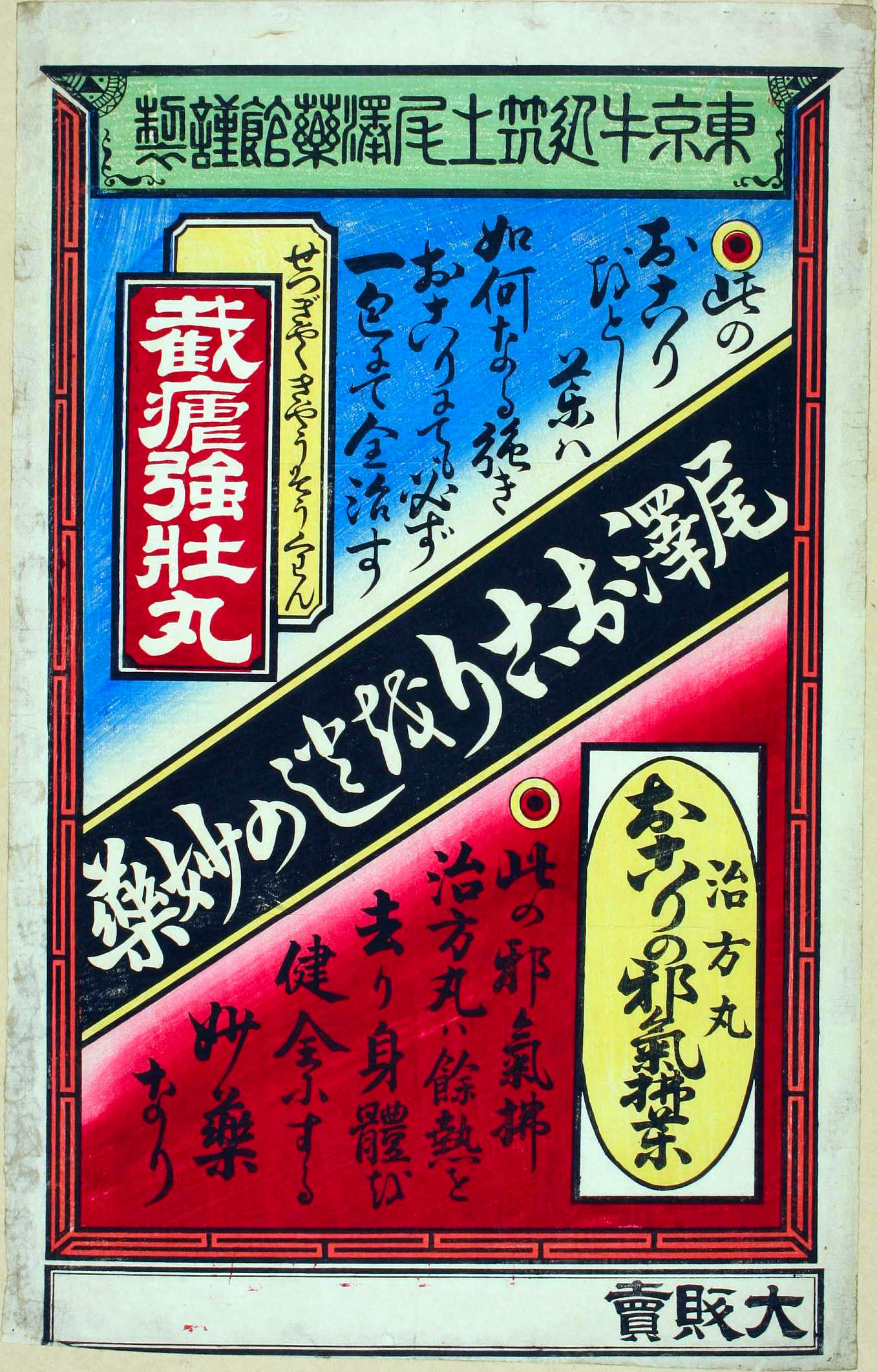 『截瘧強壯丸・治方丸おりの邪氣拂薬』。